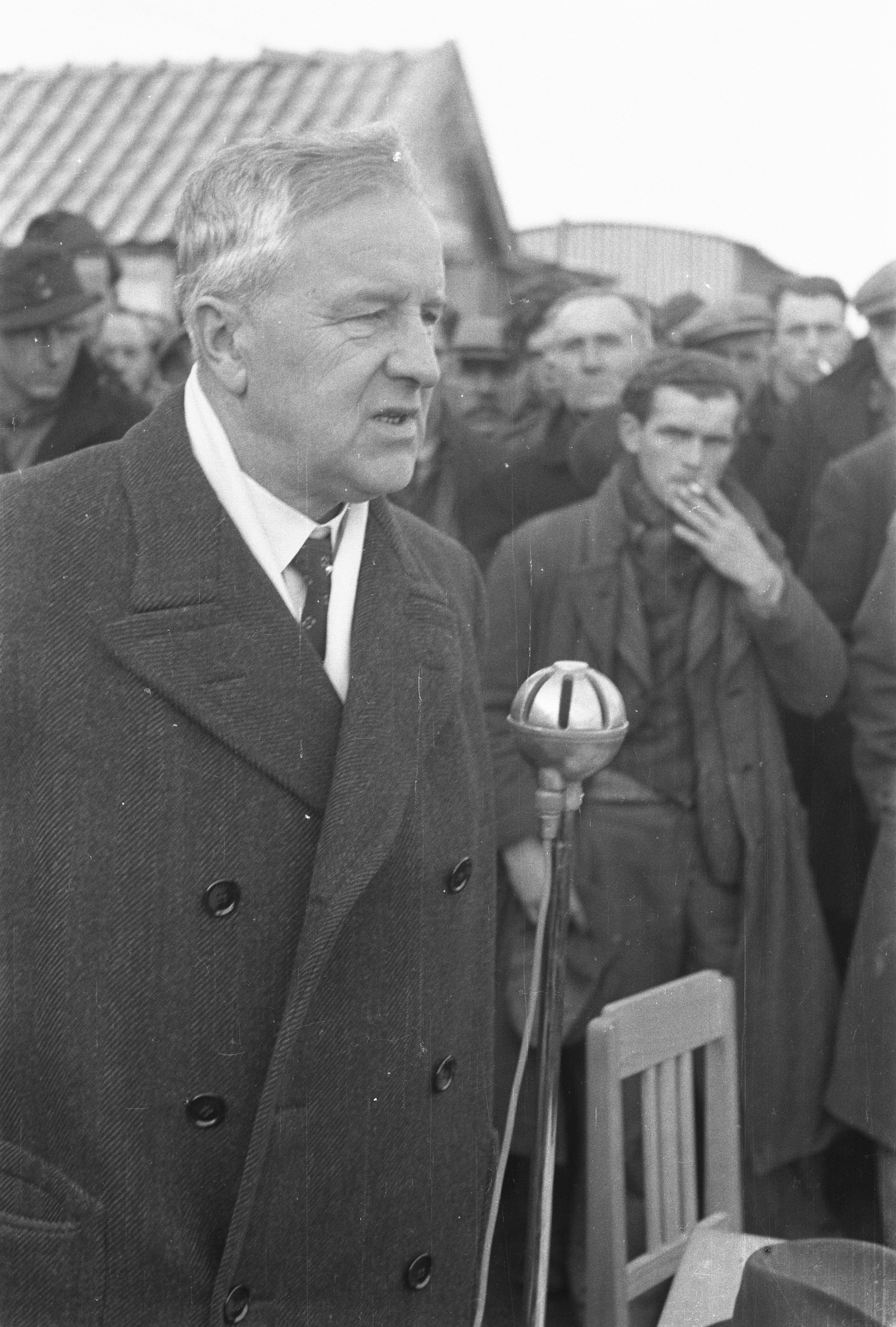 Collectie / Archief : Fotocollectie Anefo Reportage / Serie : [ onbekend ] Beschrijving : Spoorbrug bij Buggenum in gebruik genomen Annotatie : Toepraak van W. Hupkes, president-directeur van de NS Datum : 2 december 1945 Locatie : Buggenum Trefwoorden : spoorbruggen Persoonsnaam : Hupkes, W. Fotograaf : Berkel, J.A. van / Anefo Auteursrechthebbende : Nationaal Archief Materiaalsoort : Negatief (zwart/wit) Nummer archiefinventaris : bekijk toegang 2.24.01.05 Bestanddeelnummer : 901-1795